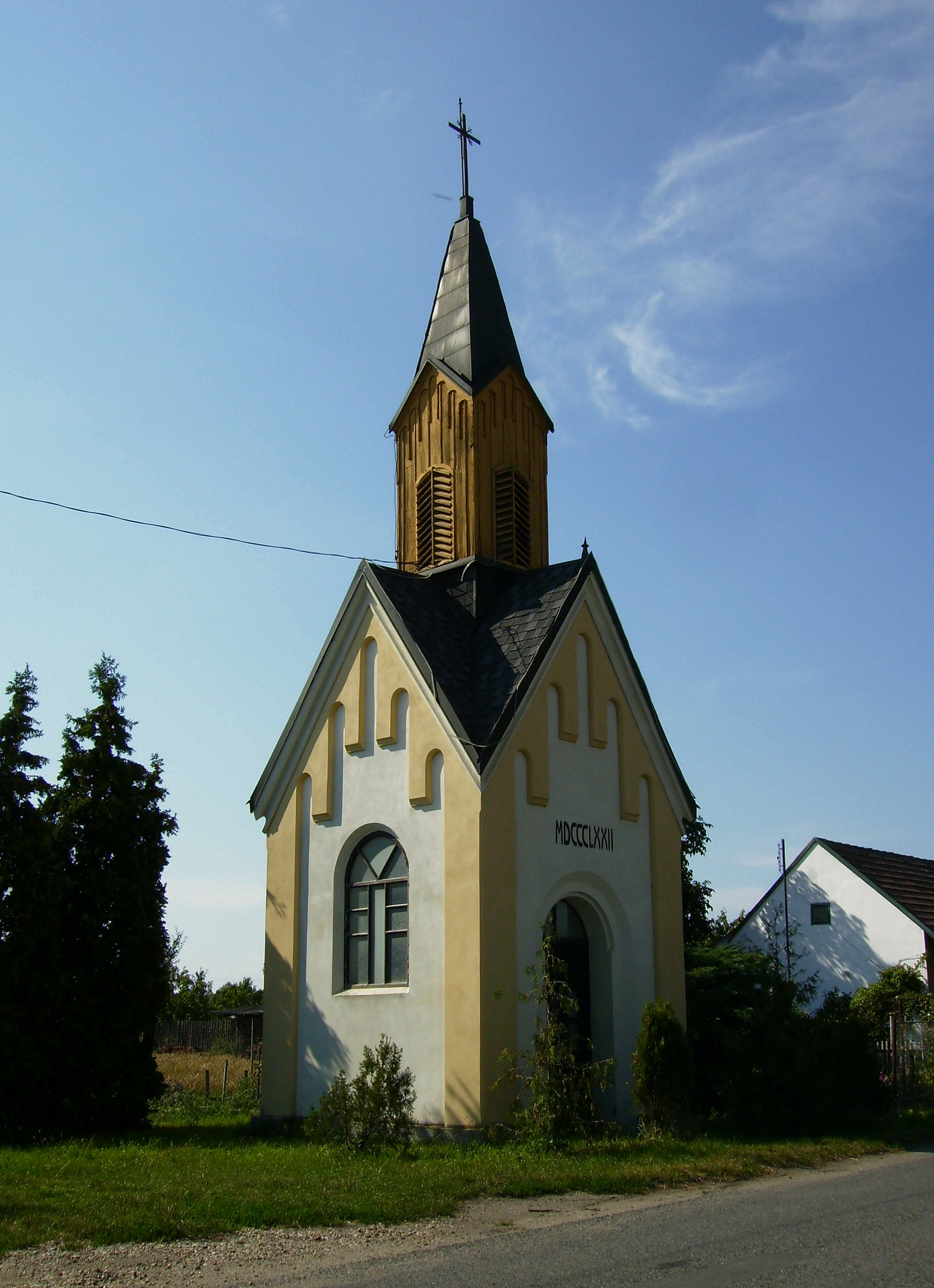 Kaplička v Lánech u Kostomlat nad Labem.